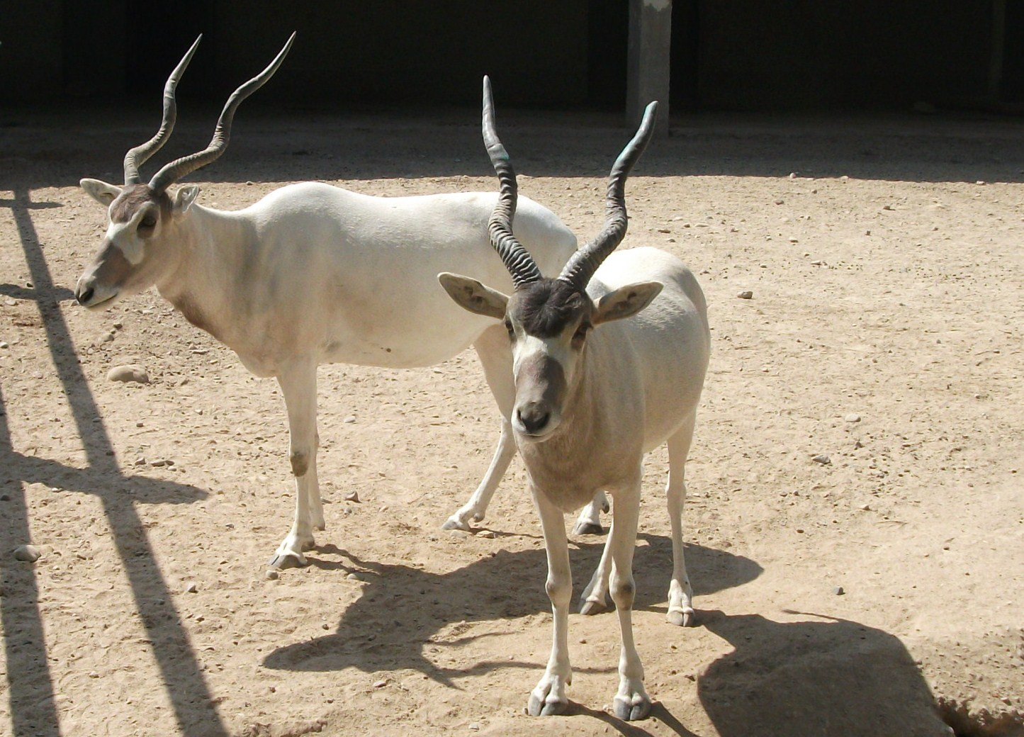 Аддаксы в зоопарке Ташкента